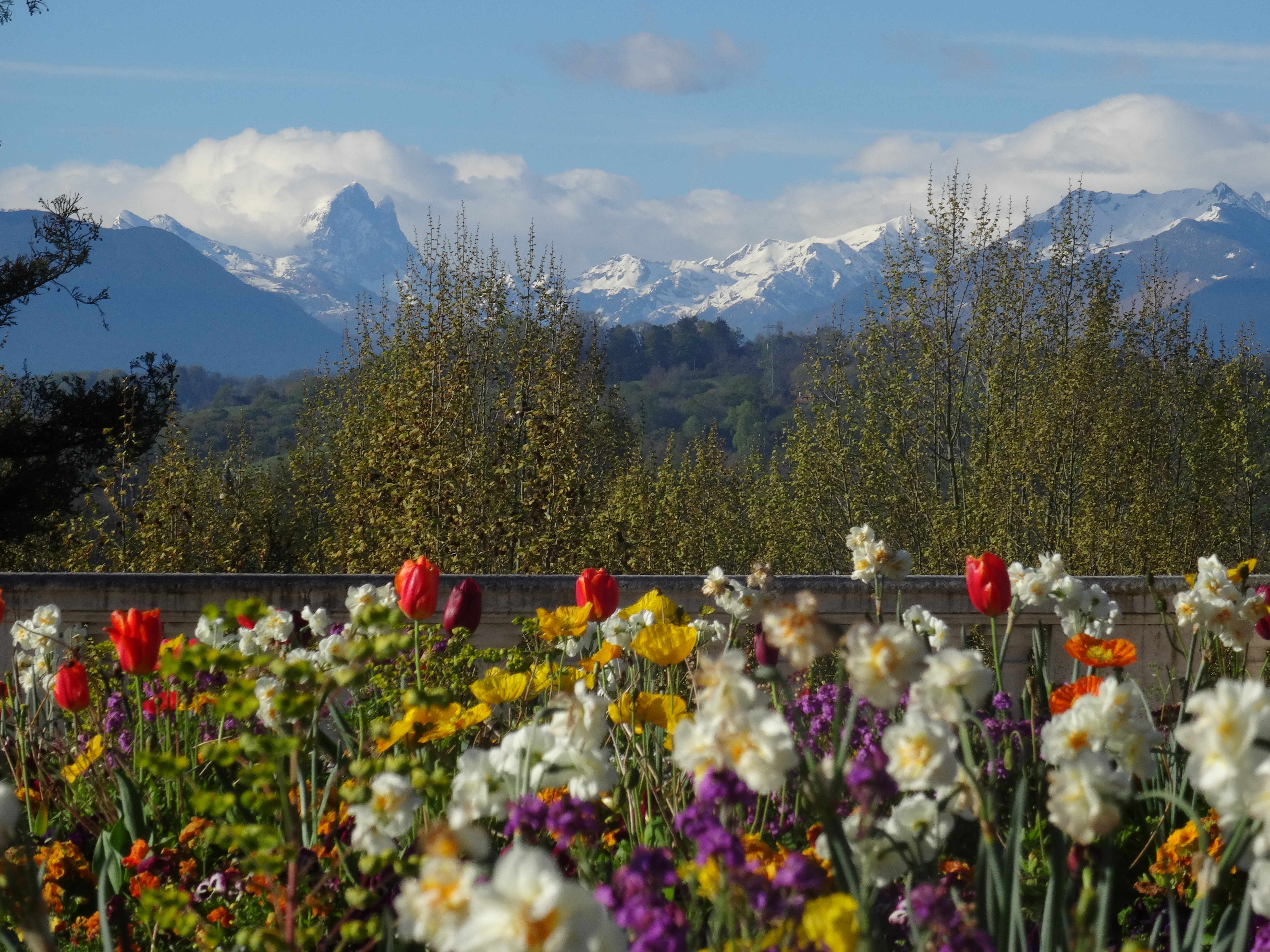 Le Pic d'Ossau vu du boulevard des Pyrénées à Pau, en premier plan un bosquet de fleurs.